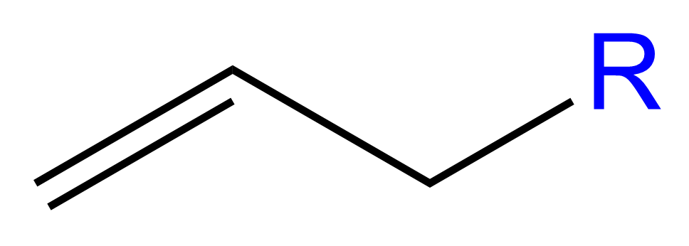 Allylgroep